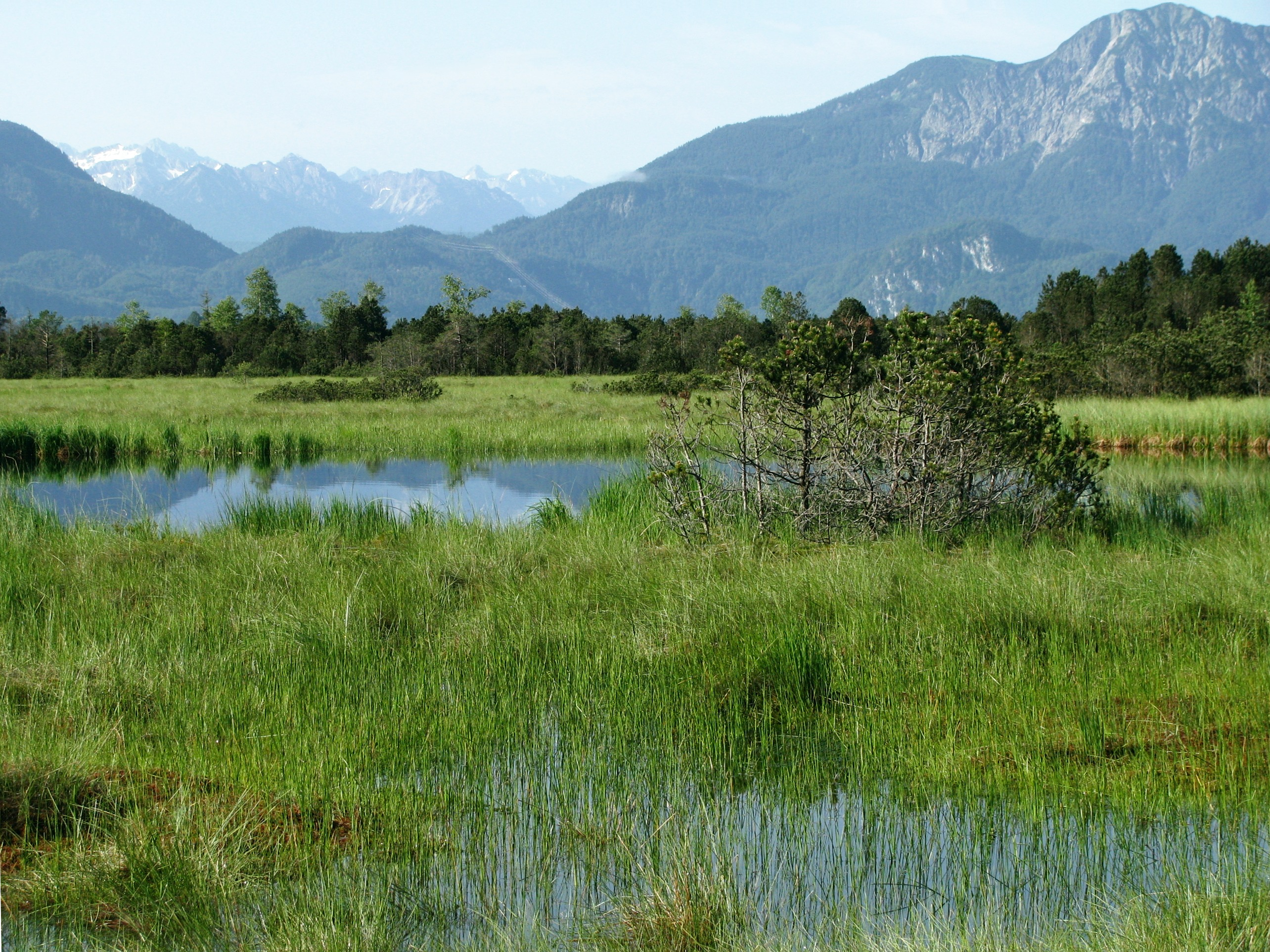 NSG Sindelbachfilz, Fichtsee, Kesselberg und Herzogstand